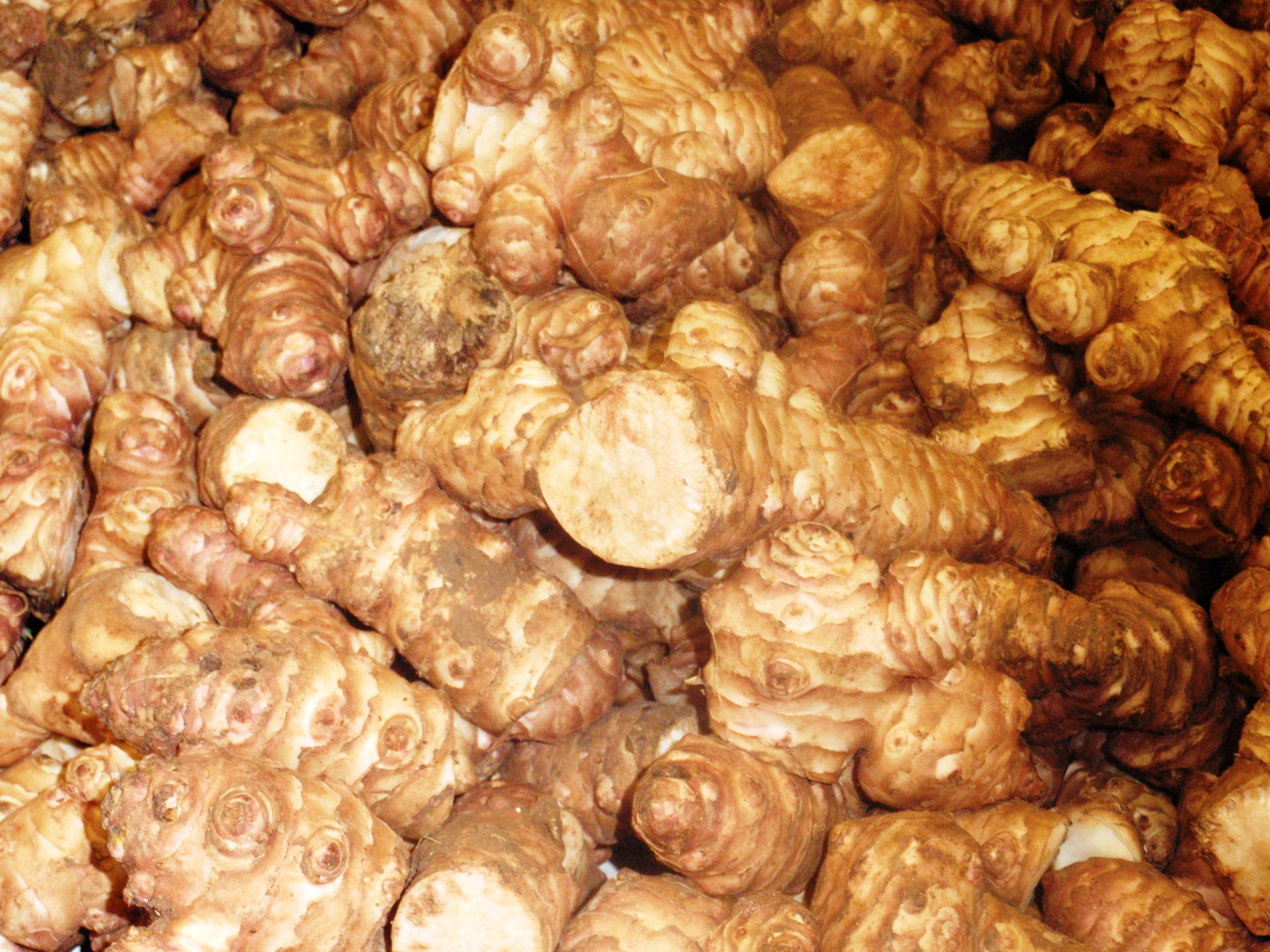 ירקות ופירות בשוק Vegetables and fruit market Jerusalem artichoke